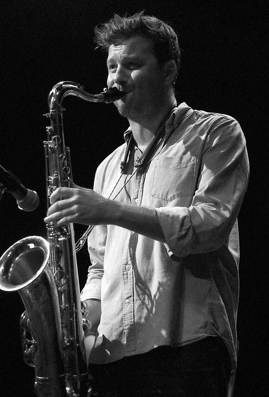 po150818 (52)-800